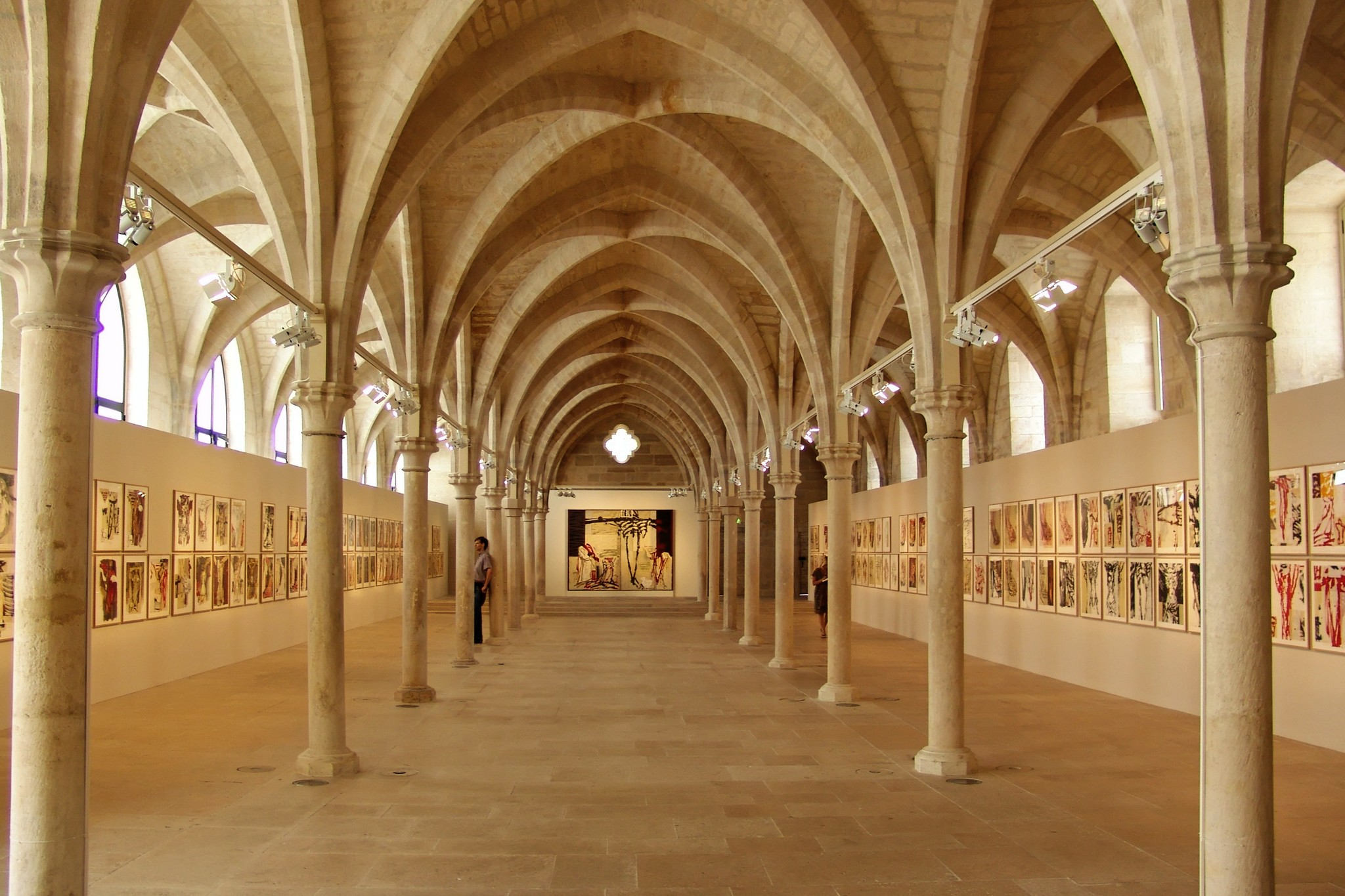 Exposition au collège des Bernardins (Paris 5ième)